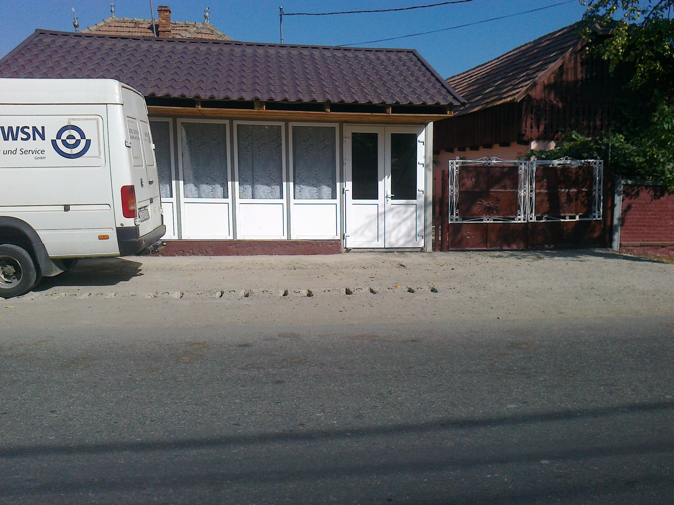 Magazin non-funcțional